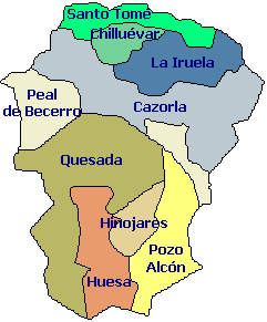 Mapa de la comarca del Alto Guadalquivir, y de sus distintos municipios. Realizado por Johnbojaen.